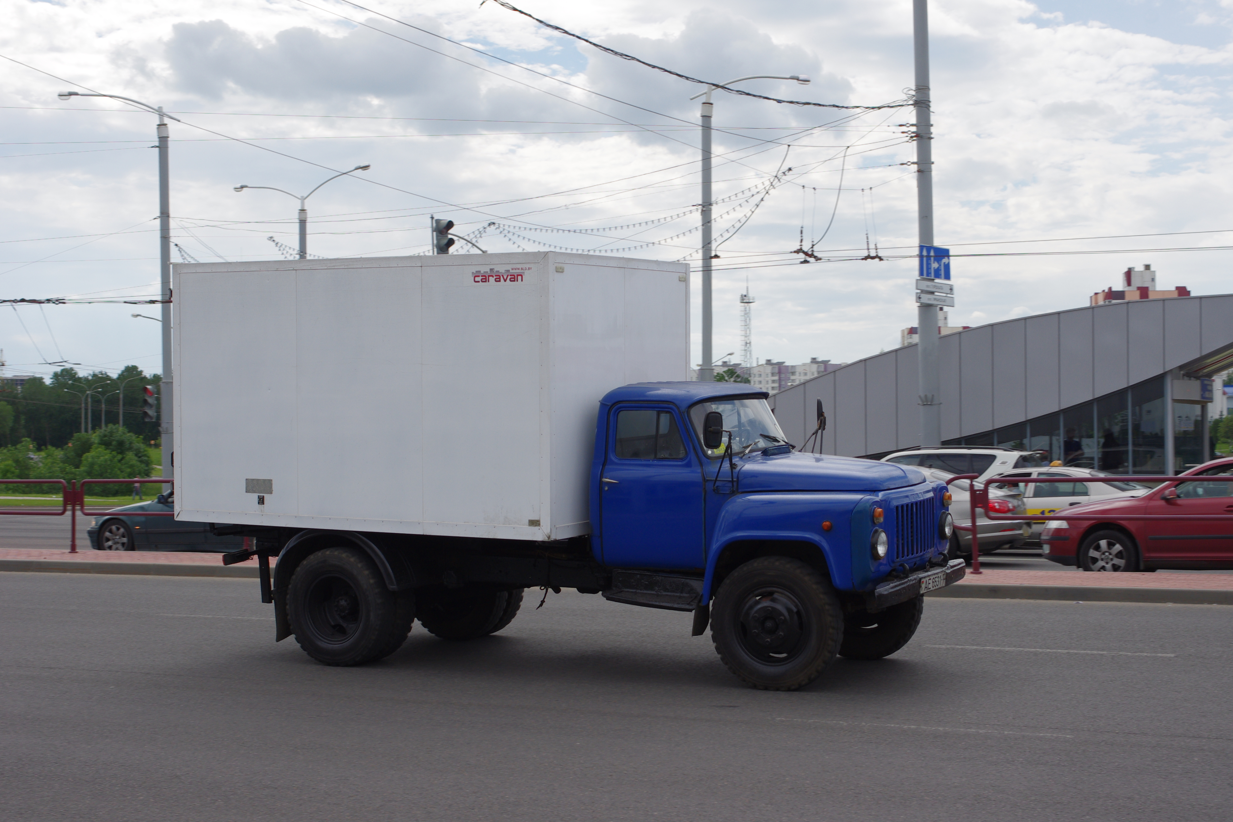 Minsk, Belarus